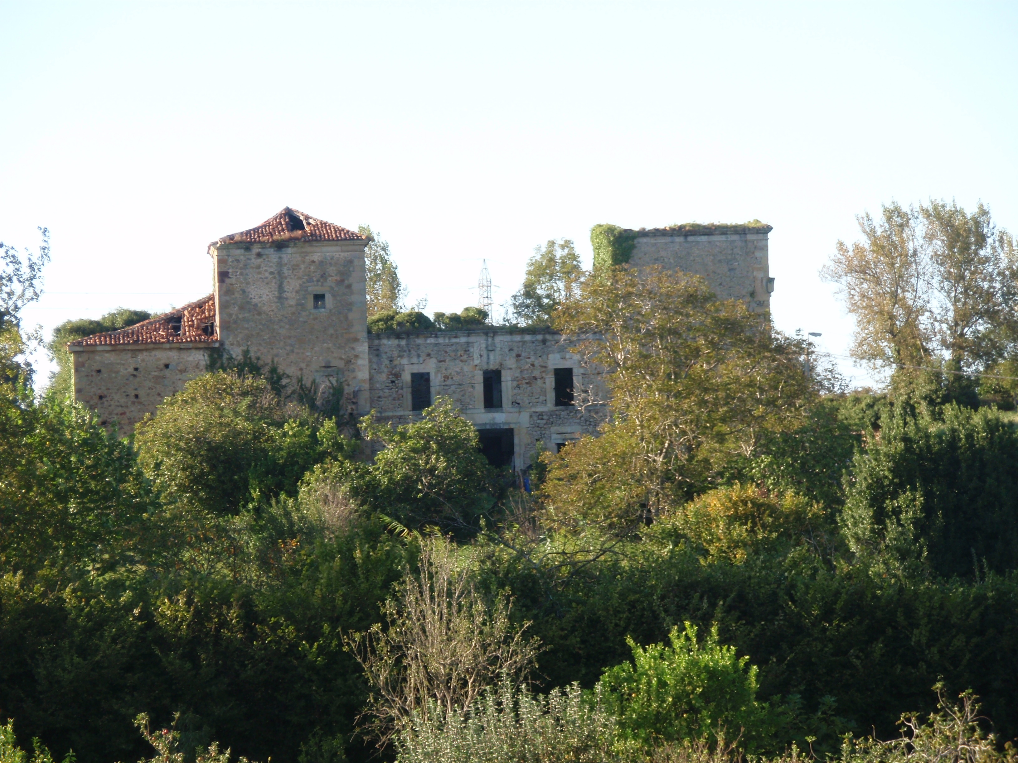 Exterior del abandonado, Palacio o Torre del Condestable de Colindres.